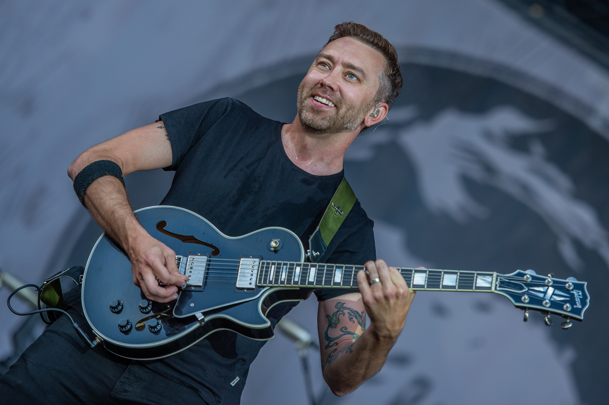 ARGO-Konzerte,Festival,Konzert,Livekonzert,Livemusik,Musik,RiP,Rise Against,Rock im Park 2018,Tim McIlrath,Zeppelin Stage